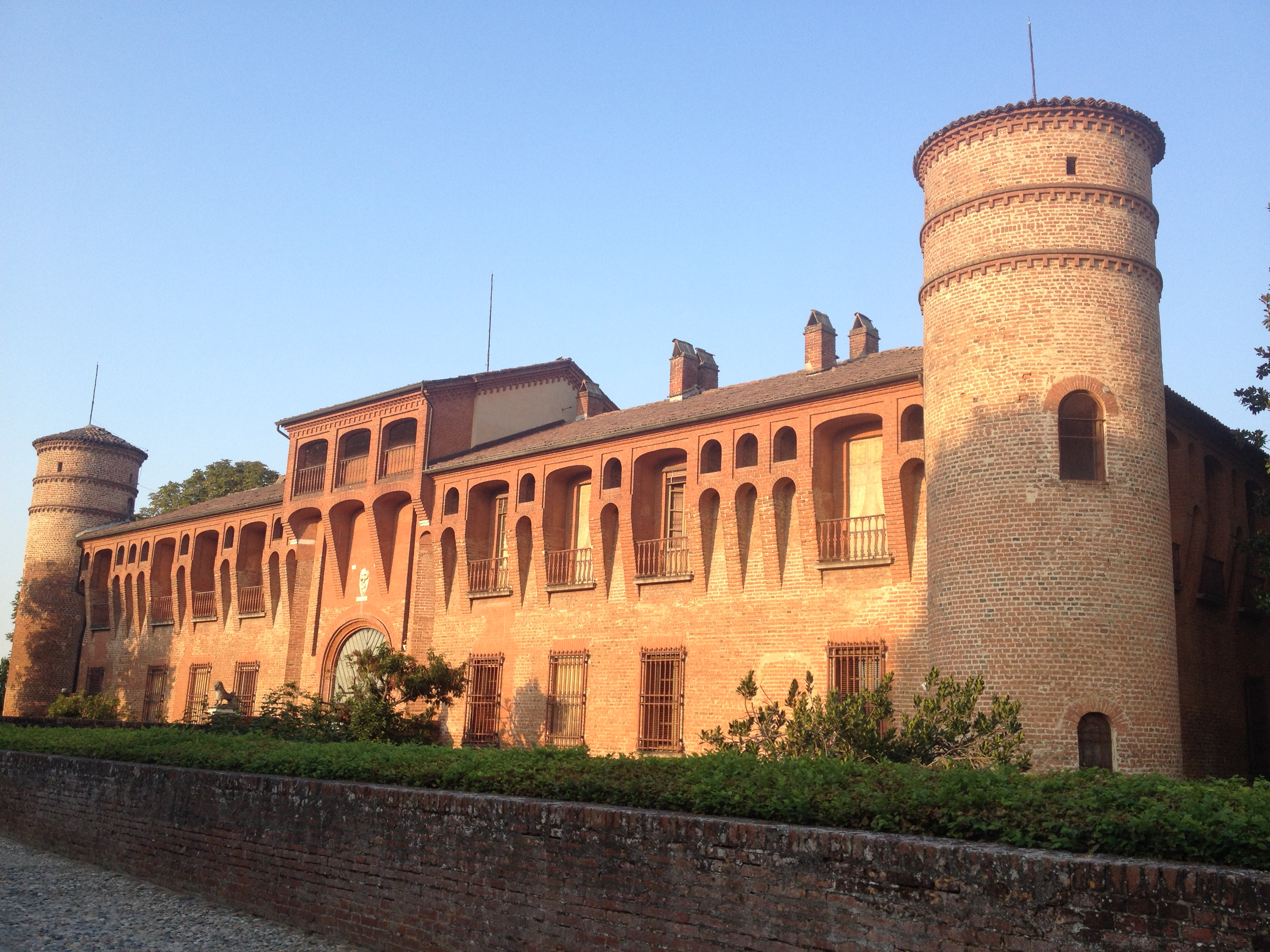 Il Castello di Frascarolo in Provincia di Pavia